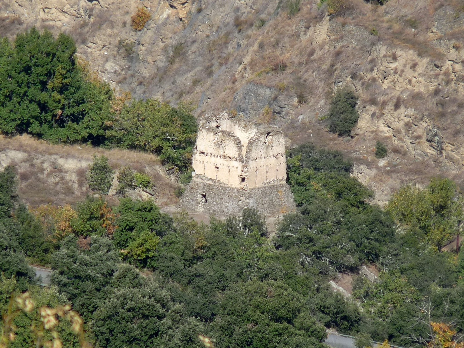 Ancienne tour de guet, Olette, Pyrénées-Orientales, France